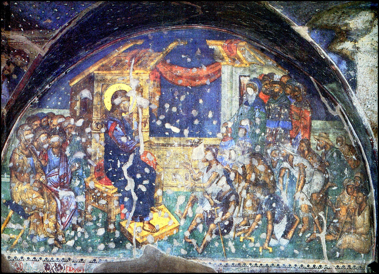 Προφήτης Ηλίας Θεσσαλονίκης. Η ίαση των τυφλών, χωλών και άλλων. Τοιχογραφία γύρω στα 1360-1380